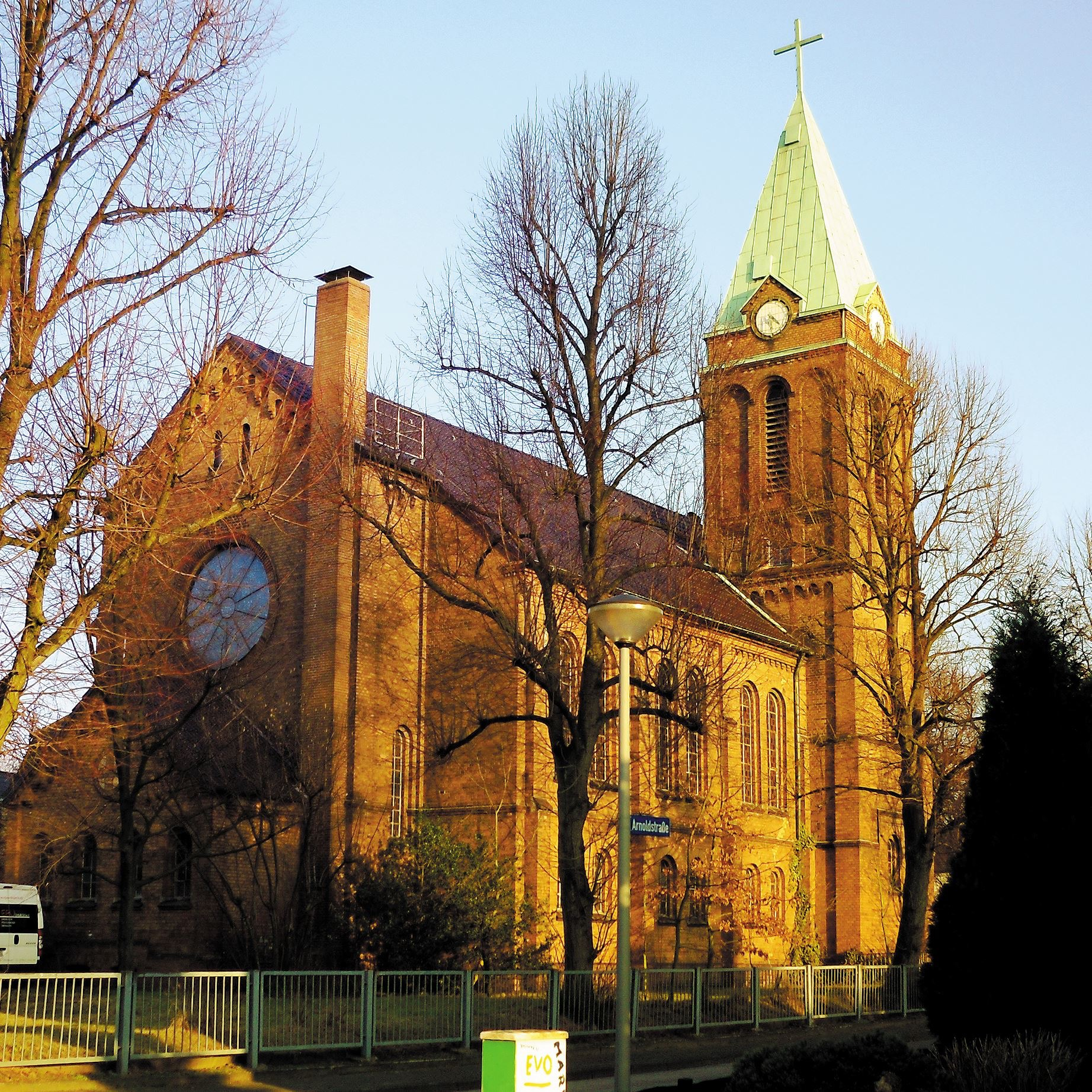 Rückseitige Ansicht der Evangelischen Kirche Kempkenstraße in Oberhausen-Schmachtendorf